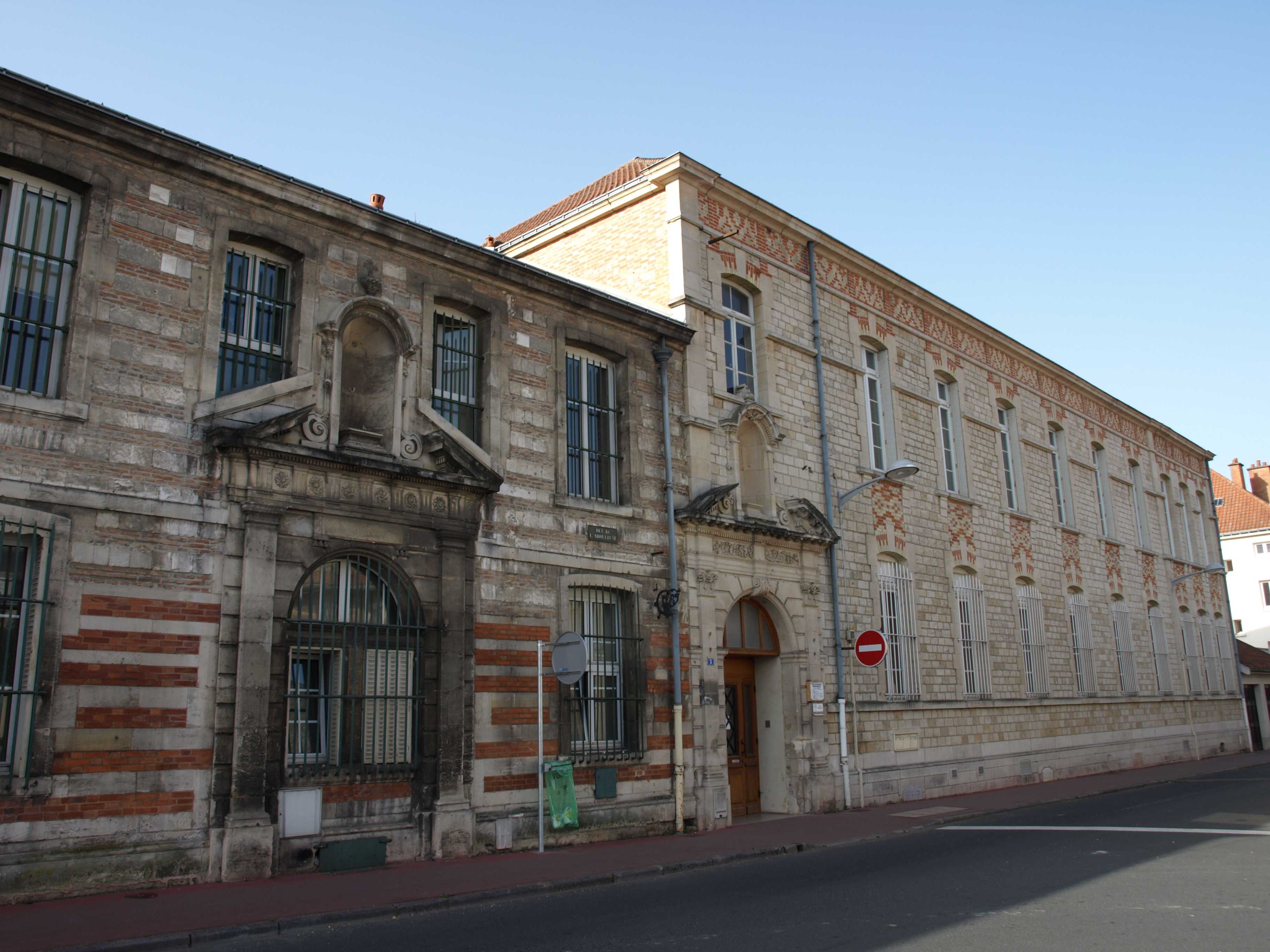 Vitry-le-François (51300 - FRANCE) : photographies Vitry-le-François (51300 - FRANCE) : Palais de Justice de la rue de l'Arquebuse (façade), actuellement gauche portail de la Gendarmerie, droite portail de la bibliothèque municipale.